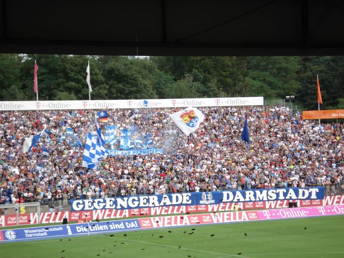 Vom A-Block auf Gegengerade beim DFB-Pokalspiel SV Darmstadt 98 - Hertha BSC Verlin